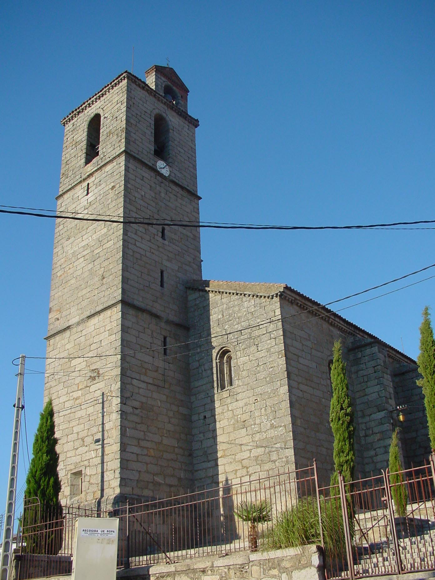 Campanario de iglesia en Cenicientos.